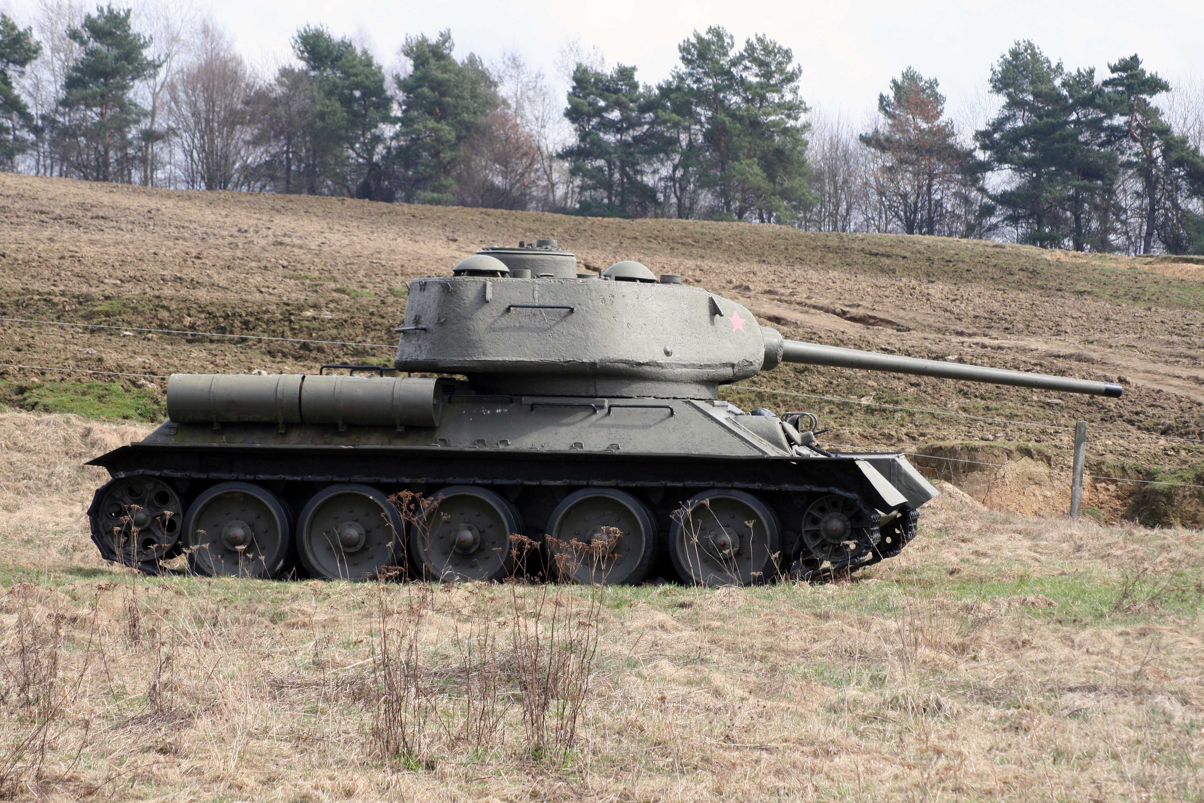 Vojenská technika z obdobia Karpatsko-duklianskej operácie v októbri 1944